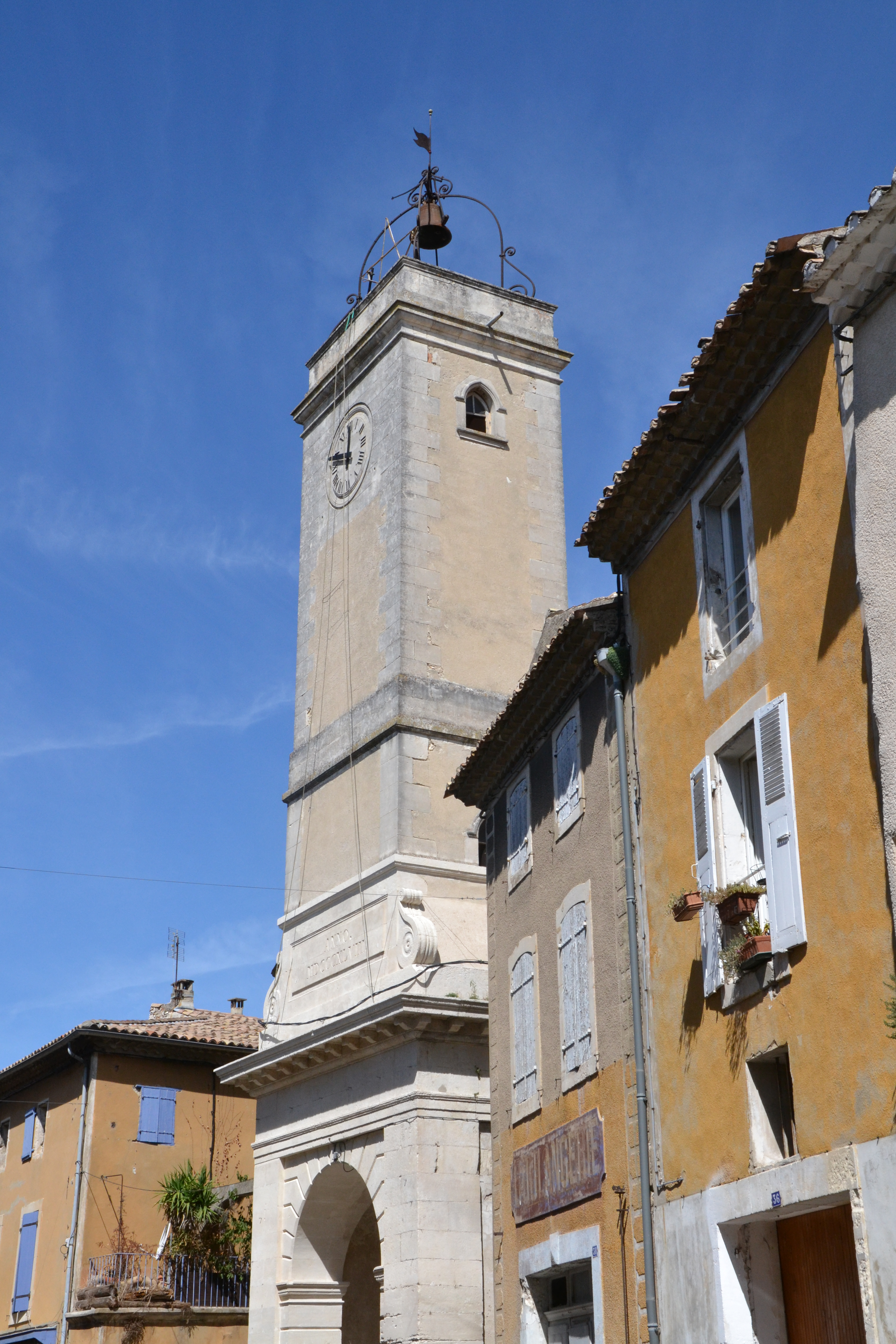 La tour de l'Horloge de Donzère (Drôme, France)